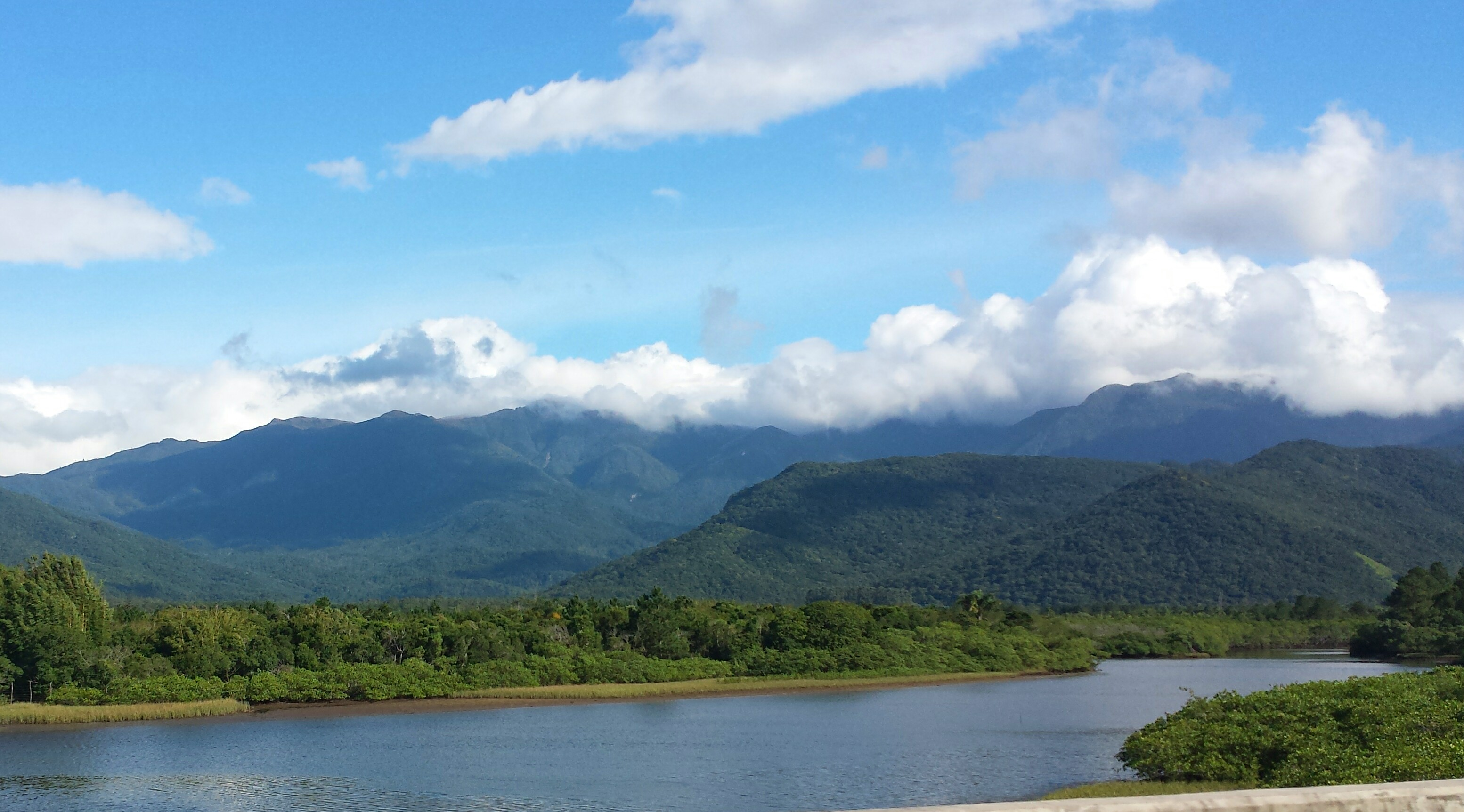 Um simples paraíso